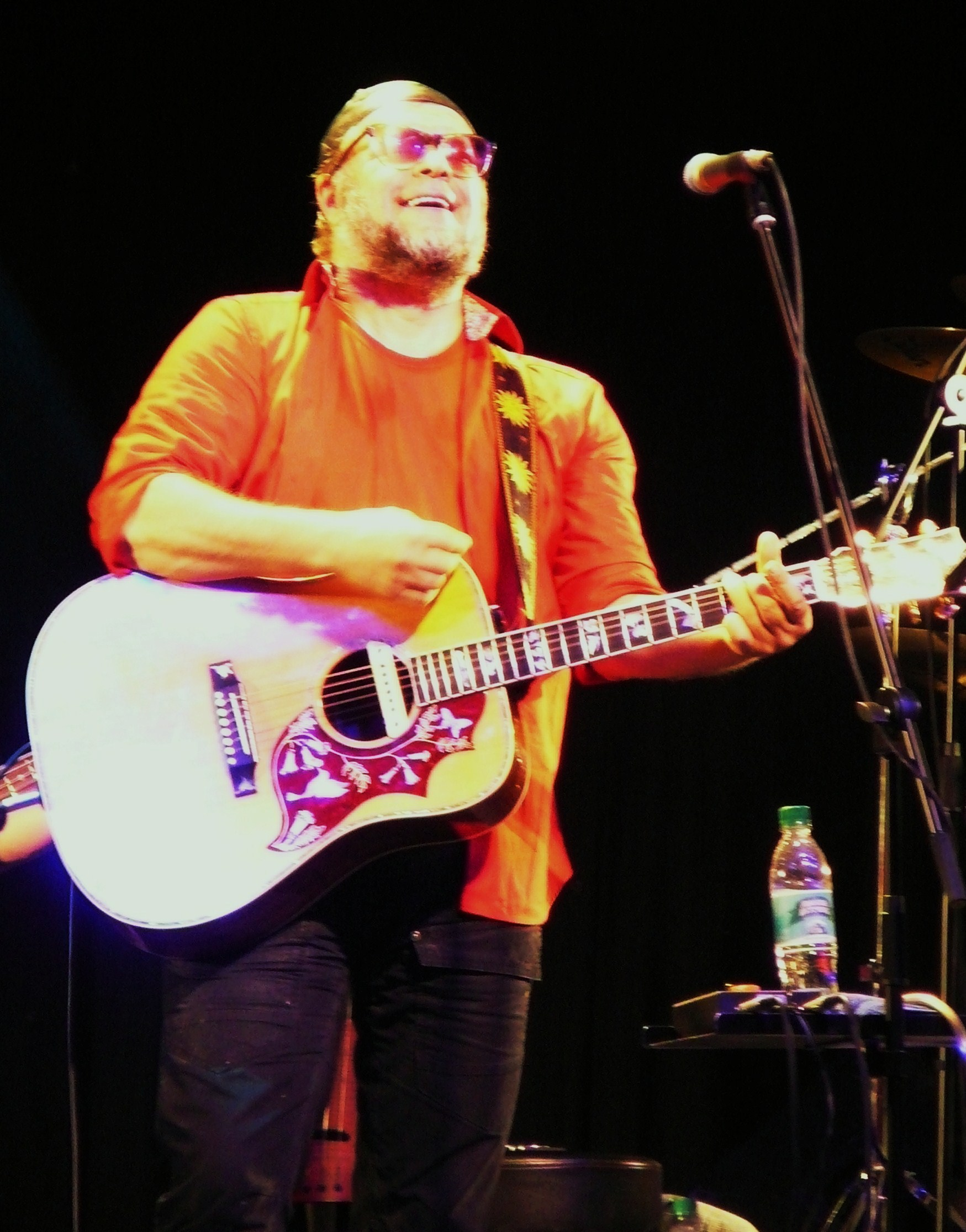 Борис Гребенщиков на концерте группы «Аквариум», проходившем в рамках юбилейного тура «4.000 лет» (г. Казань, 24 апреля 2012 г.).